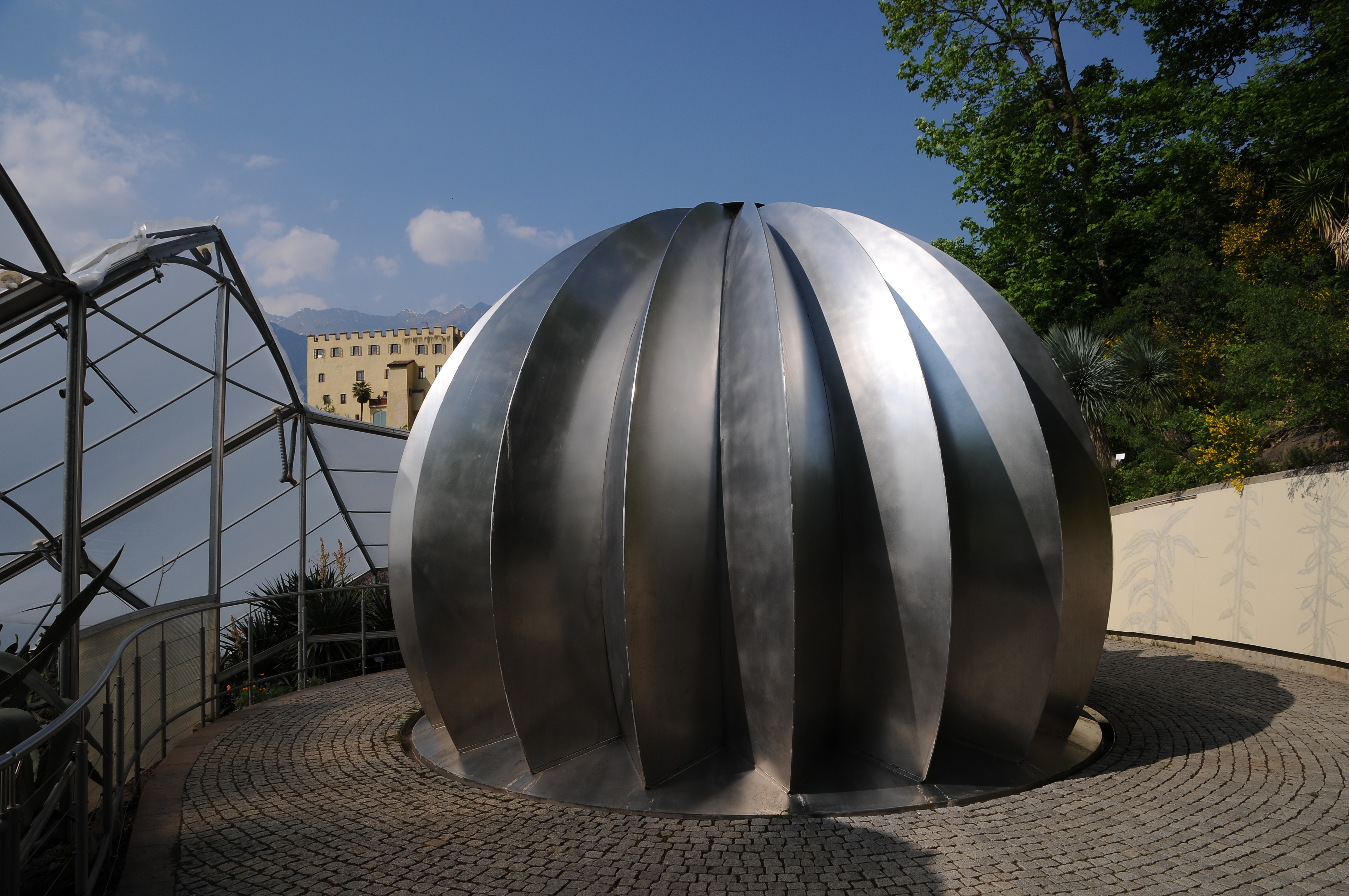 Die Gärten von Schloss Trauttmansdorff liegen am östlichen Stadtrand von Meran in Südtiro /Italien. Der nach seinem Wahrzeichen – Schloss Trauttmansdorff – benannte botanische Garten der Kurstadt Meran nimmt eine Fläche von rund zwölf Hektar ein.